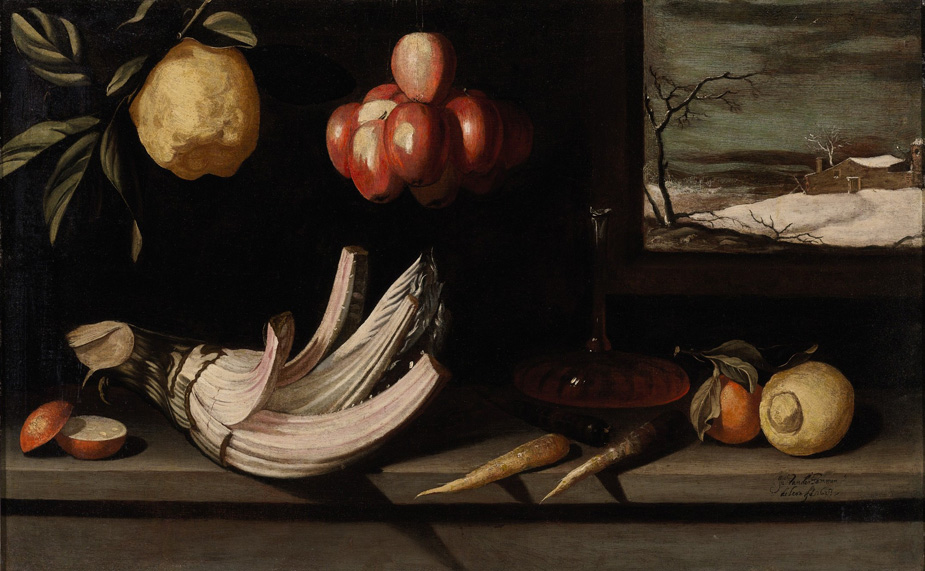 Juan van der Hamen, Bodegón con cardo, hortalizas y paisaje nevado, 1623, óleo sobre lienzo, 67 x 104, procedente de la colección marqués de Casa Torres.